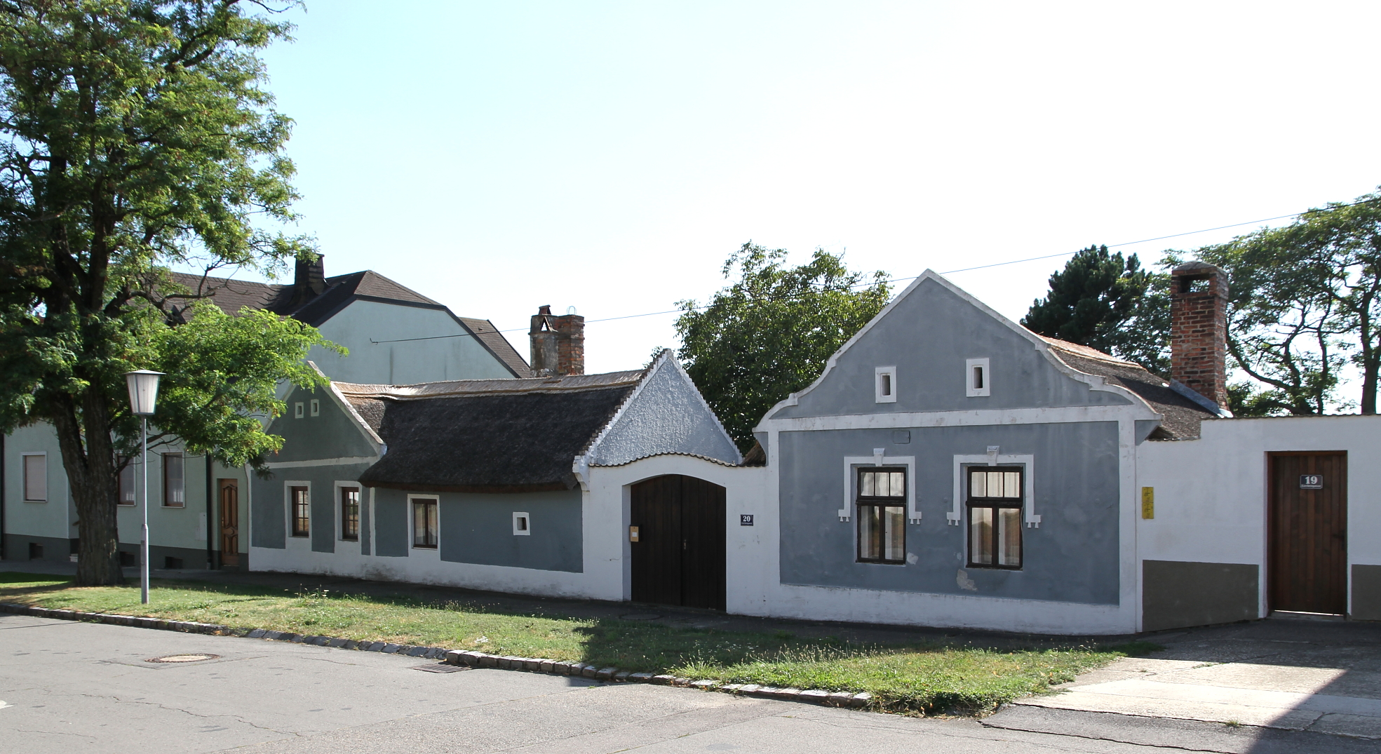 Bauernhof, Kirchengasse 20, in der burgenländischen Gemeinde Sankt Andrä am Zicksee. Ein Hakenhof mit Zwerchtrakt und Schilfrohrdeckung.